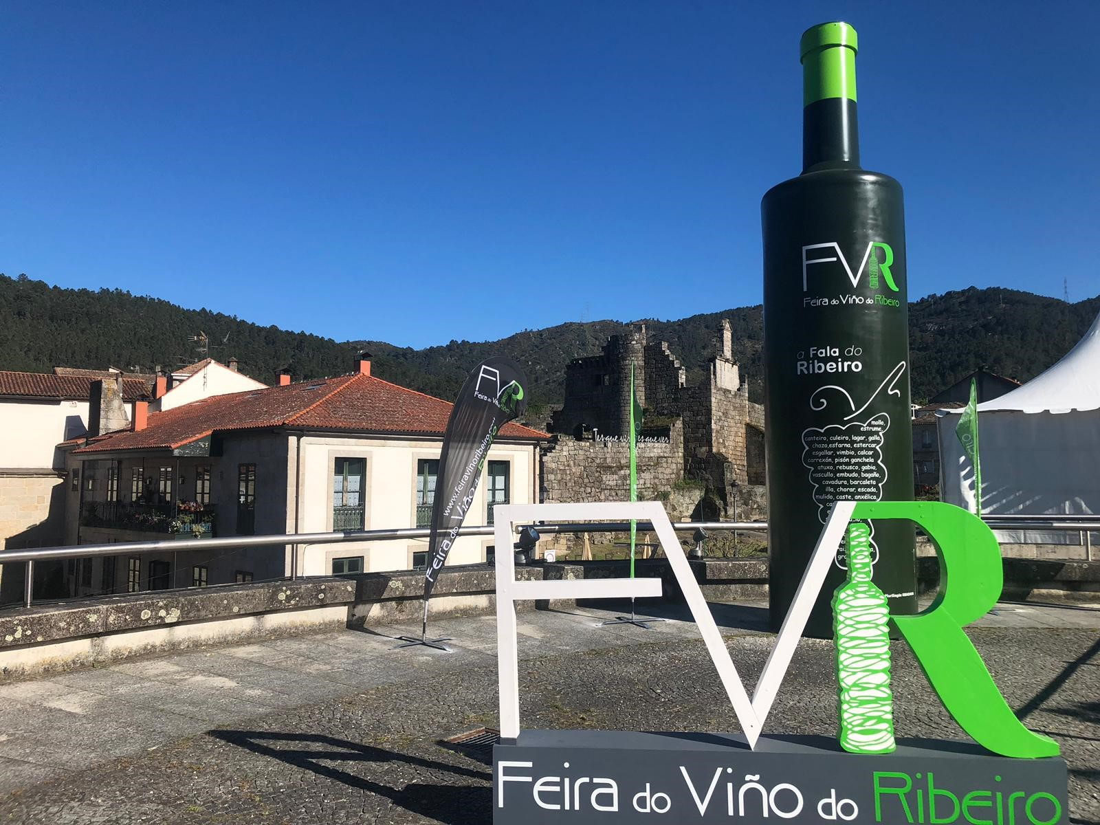 Recinto da Alameda onde se celebra a Feira